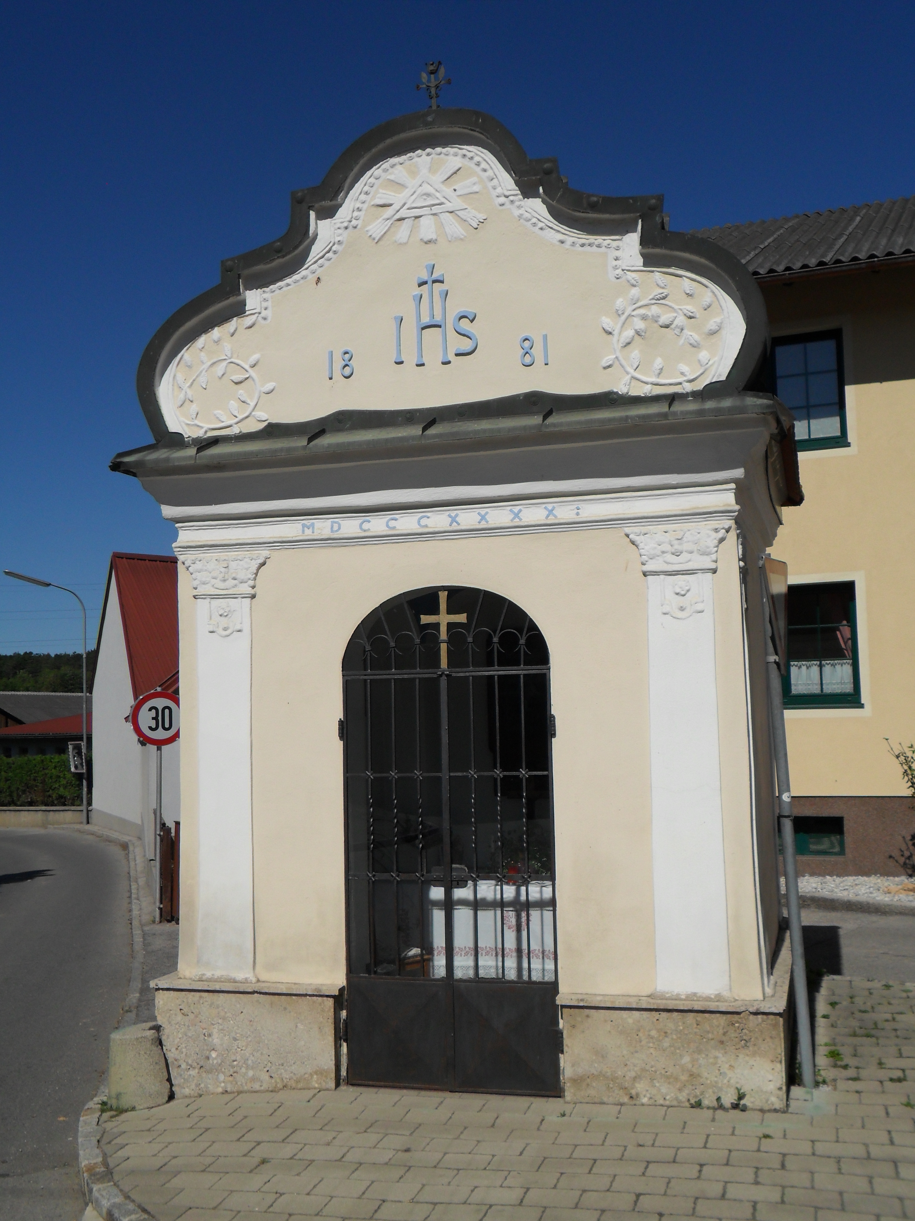 Wegkapelle in Landschach (Gemeinde Grafenbach-St. Valentin)